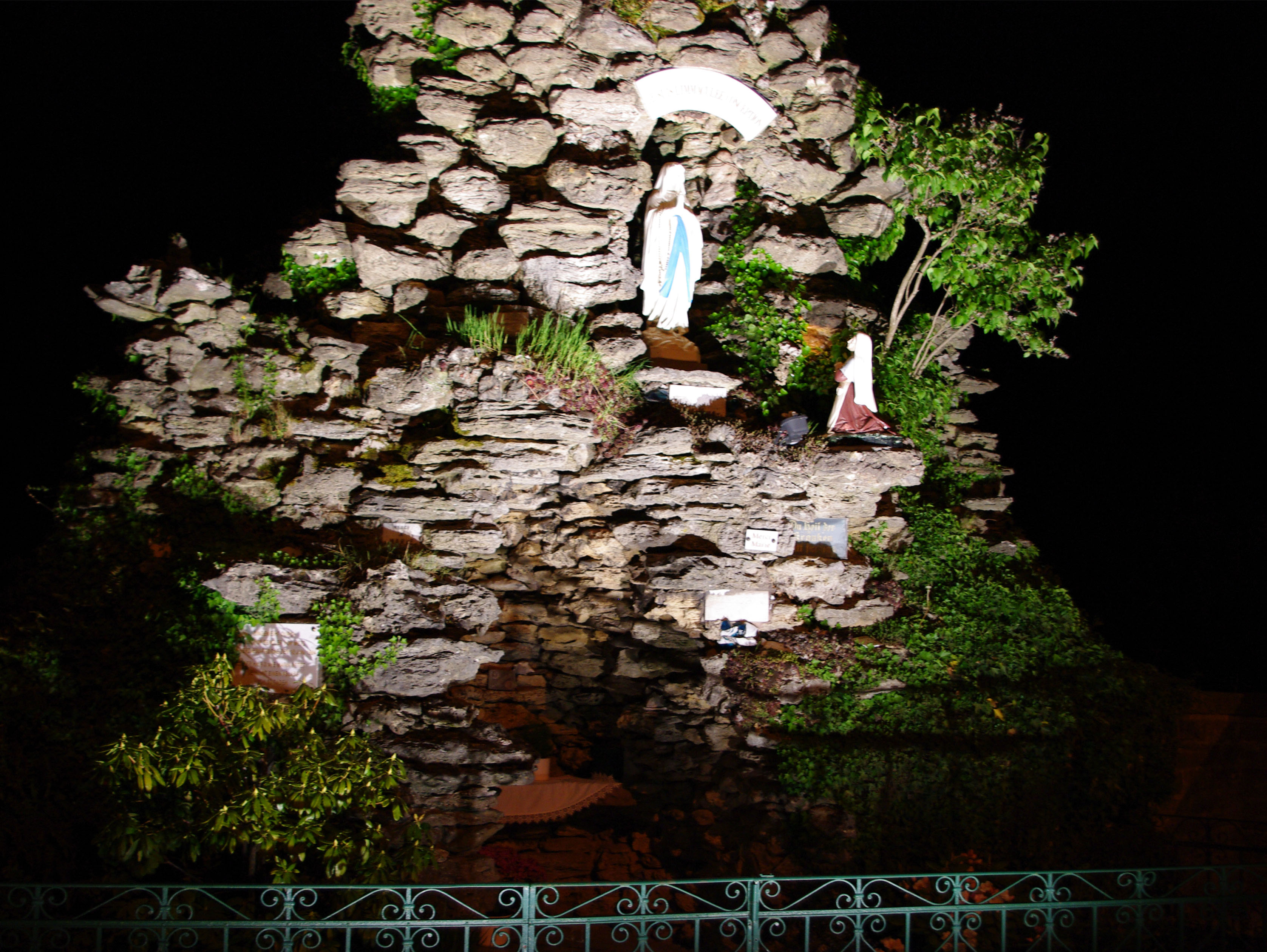 Grotte de Lourdes de Garrebourg